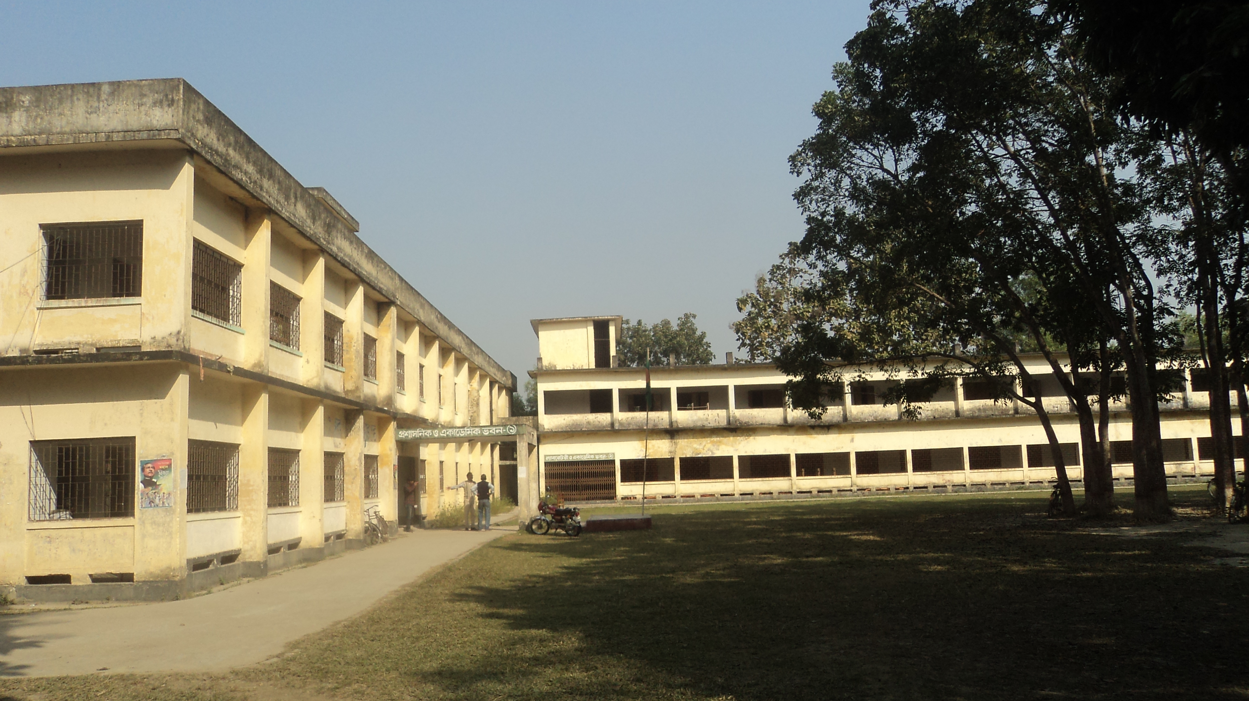 সরিষাবাড়ী কলেজ ক্যাম্পাস